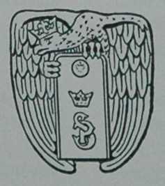 Odznaka Szkoły Podchorążych Piechoty w Komorowie , The sign of cadets of Polish infantry 1935